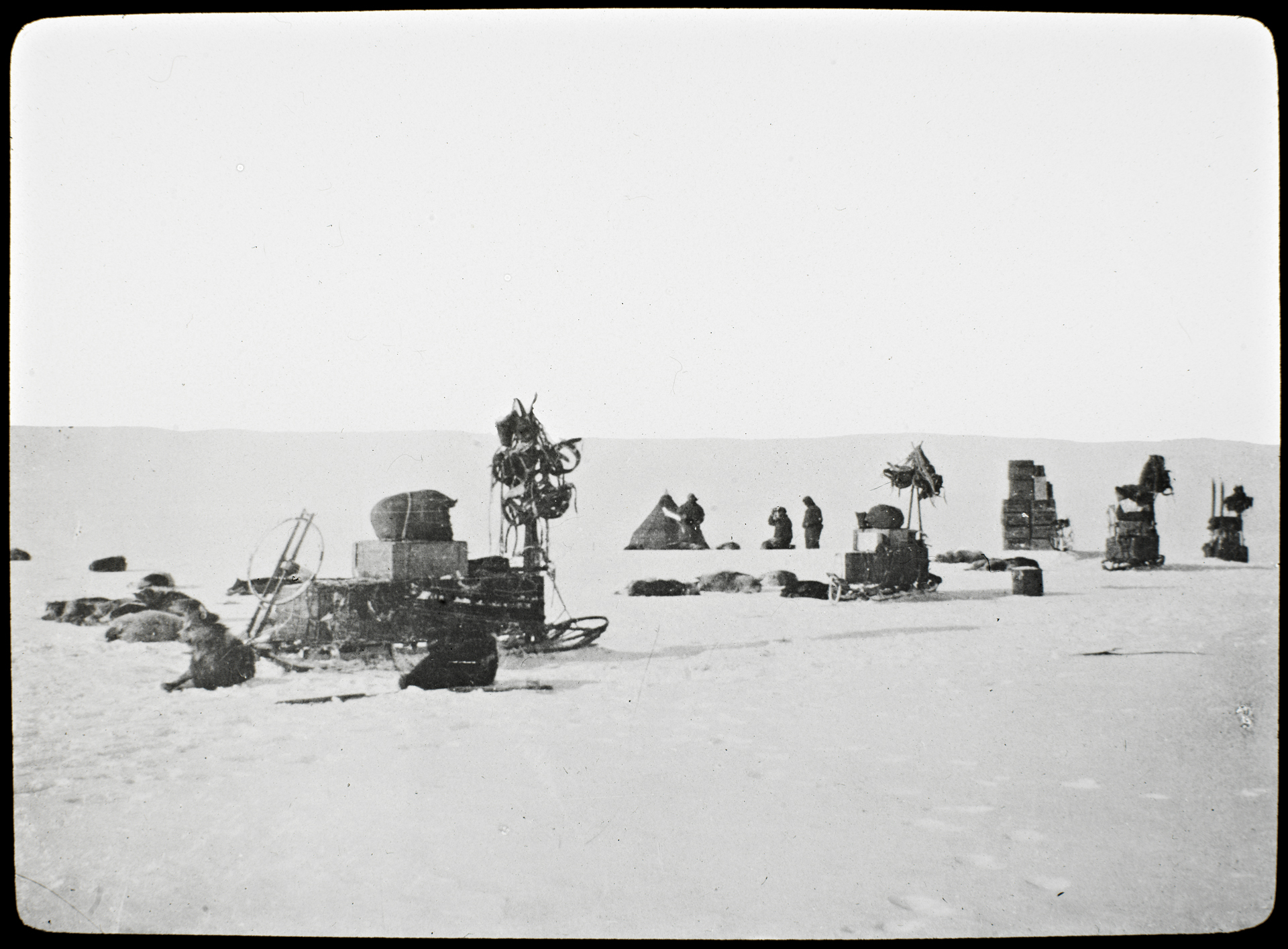 Tittel / Title: Det blir gjort observasjoner på en leirplass under ferden til Sydpolen Motiv / Motif: Positiv glassplate. Bakerst på en av sledene kan man se et distansehjul. Ferden fra Framheim til polpunktet og tilbake tok 99 dager og omtrent 3000 km ble tilbakelagt. Dato / Date: oktober-desember 1911 Fotograf / Photographer: ukjent / unknown Sted / Place: Antarktis Eier / Owner Institution: Nasjonalbiblioteket / National Library of Norway Lenke / Link: Bildesignatur / Image Number: bldsa_NPRA0780